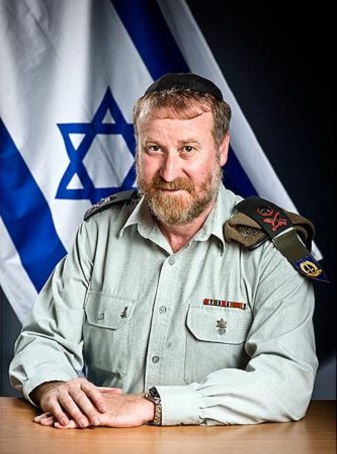 Avichai Mandelblit